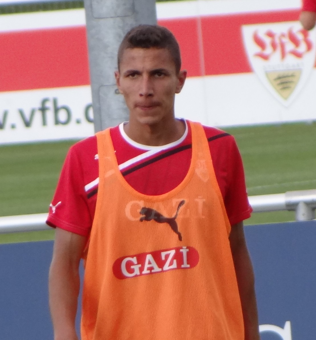 aufgenommen beim VfB-Training von